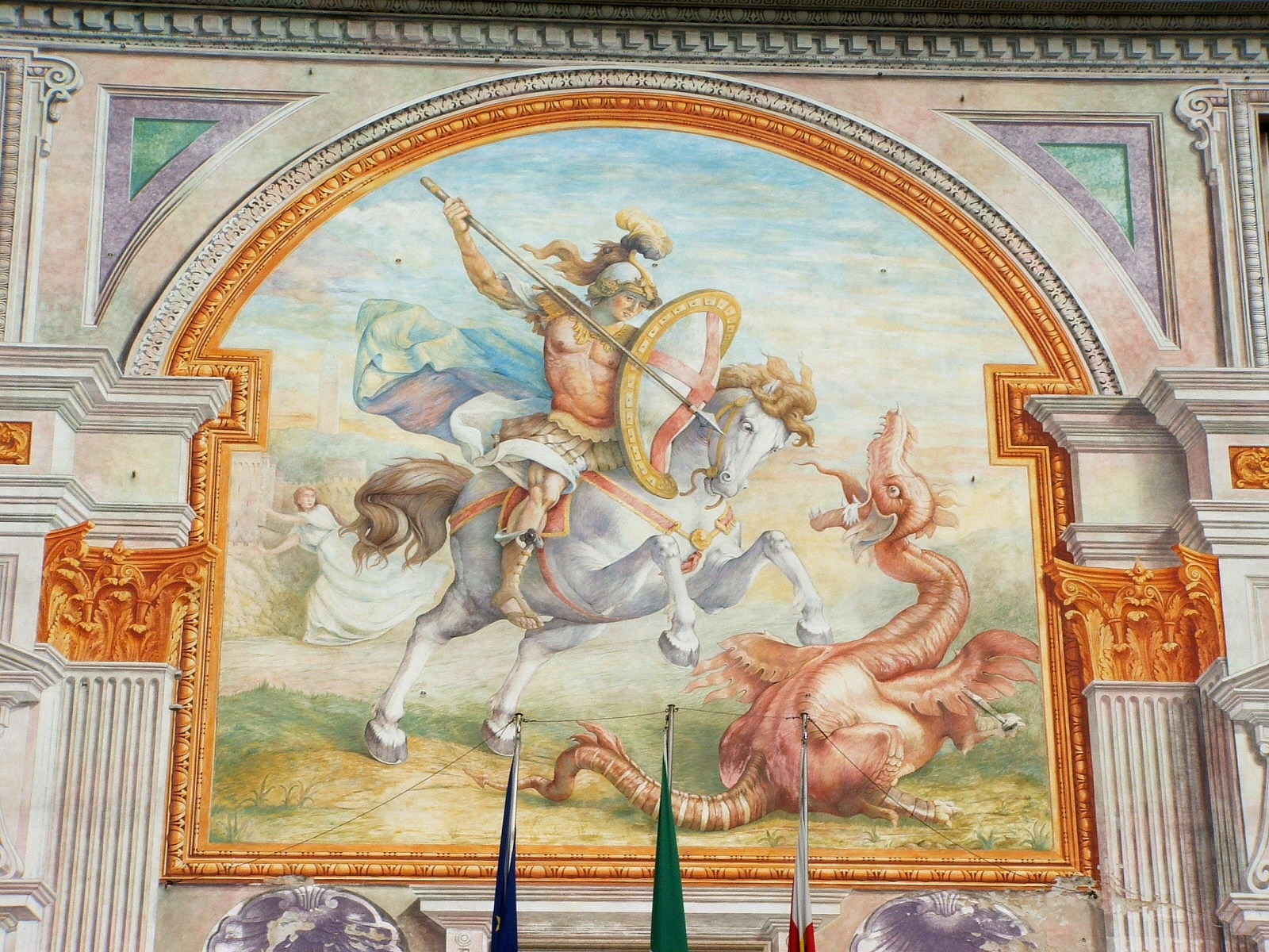 prospetto principale